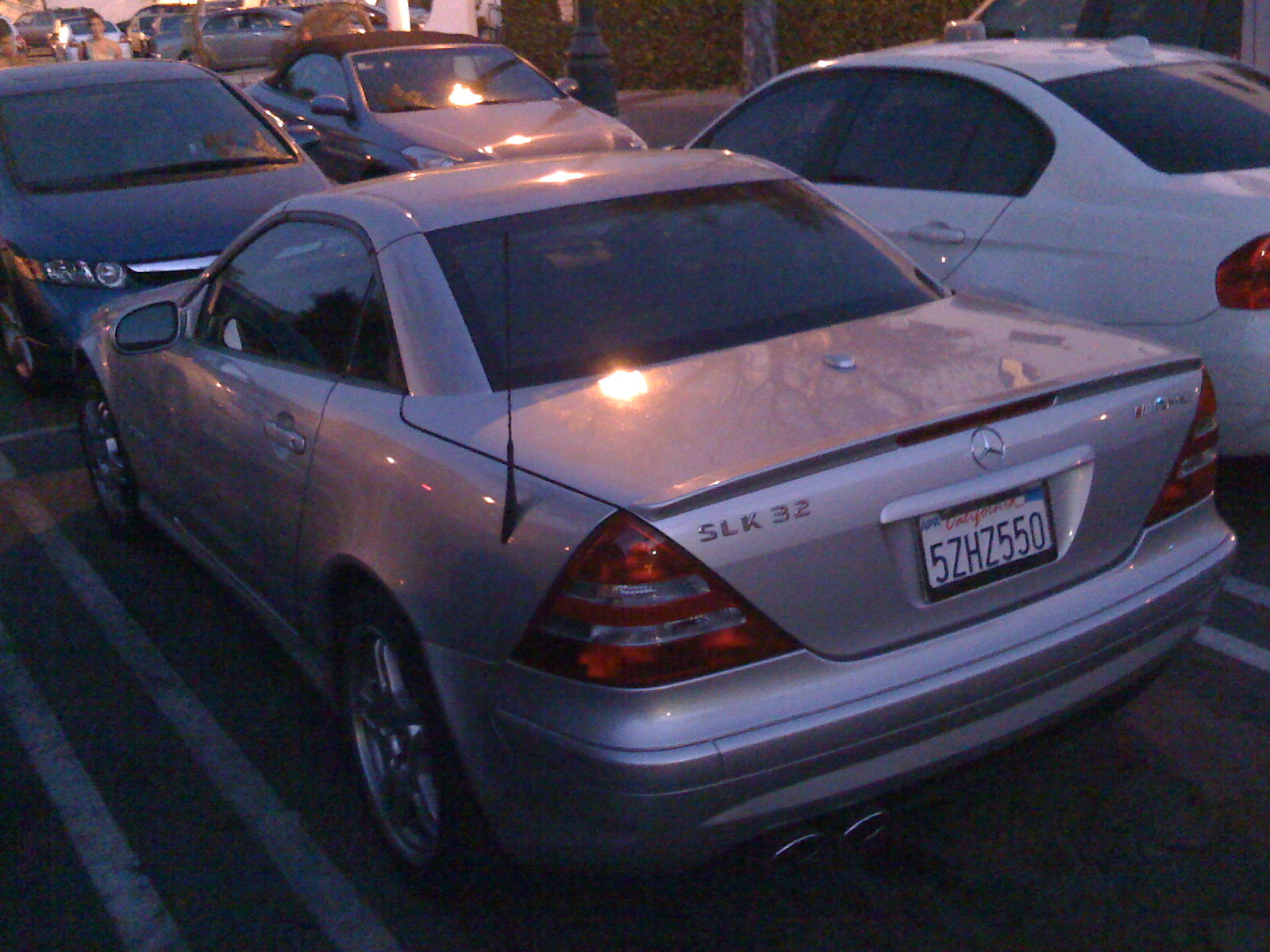 Mercedes-Benz R170 SLK 32 AMG